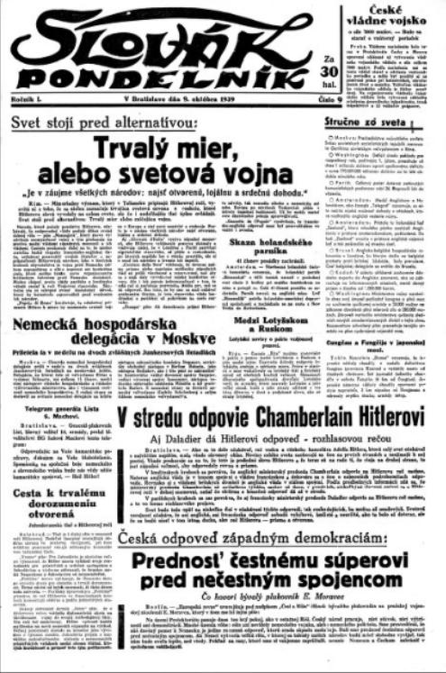 Titulný list týždenníka Slovák Pondelník.